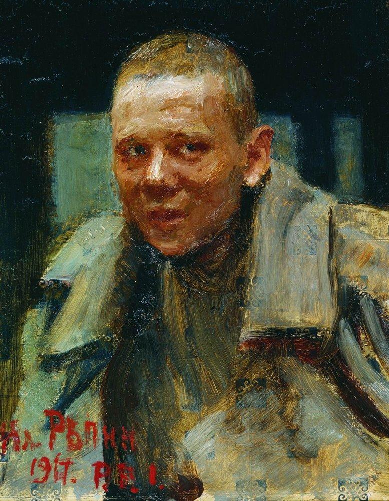 Дезертир